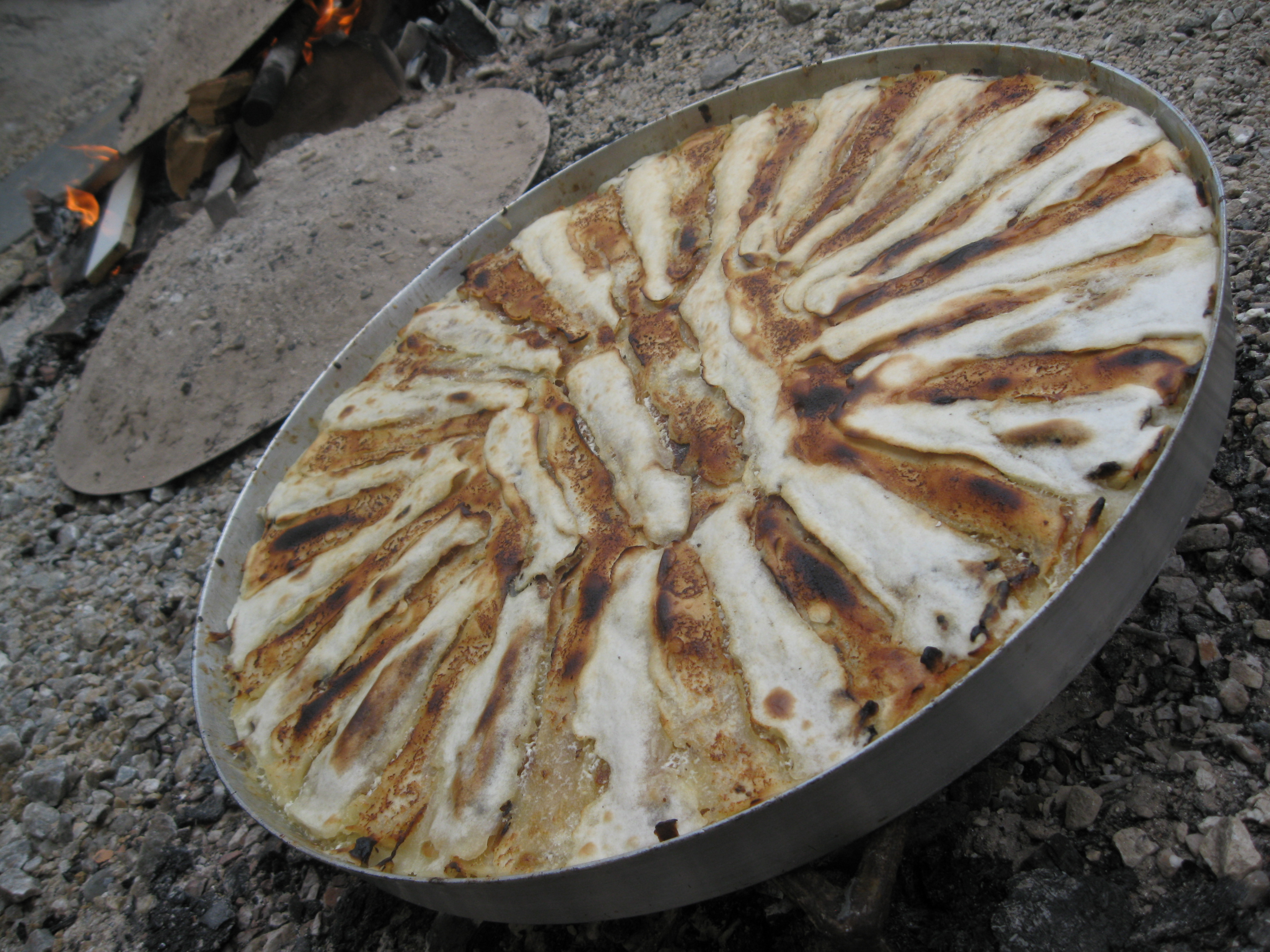 Flija e pregatitur me saça është specialitet i kuzhinës tradicionale kosovare, cili kryesisht gatuhet në vende malore.